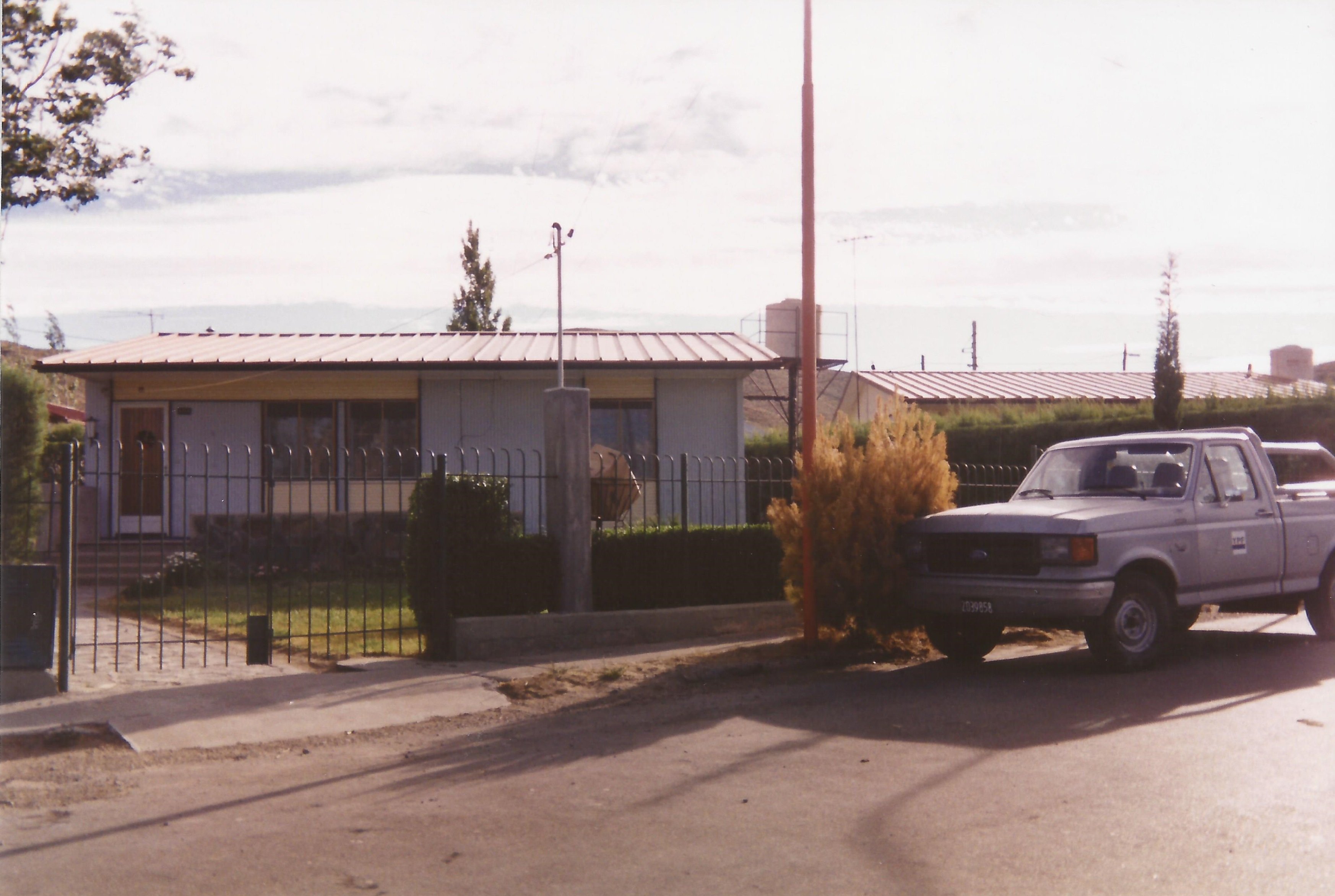 Vivienda y camioneta de YPF en Cañadón Seco, Santa Cruz, Argentina en diciembre de 1994